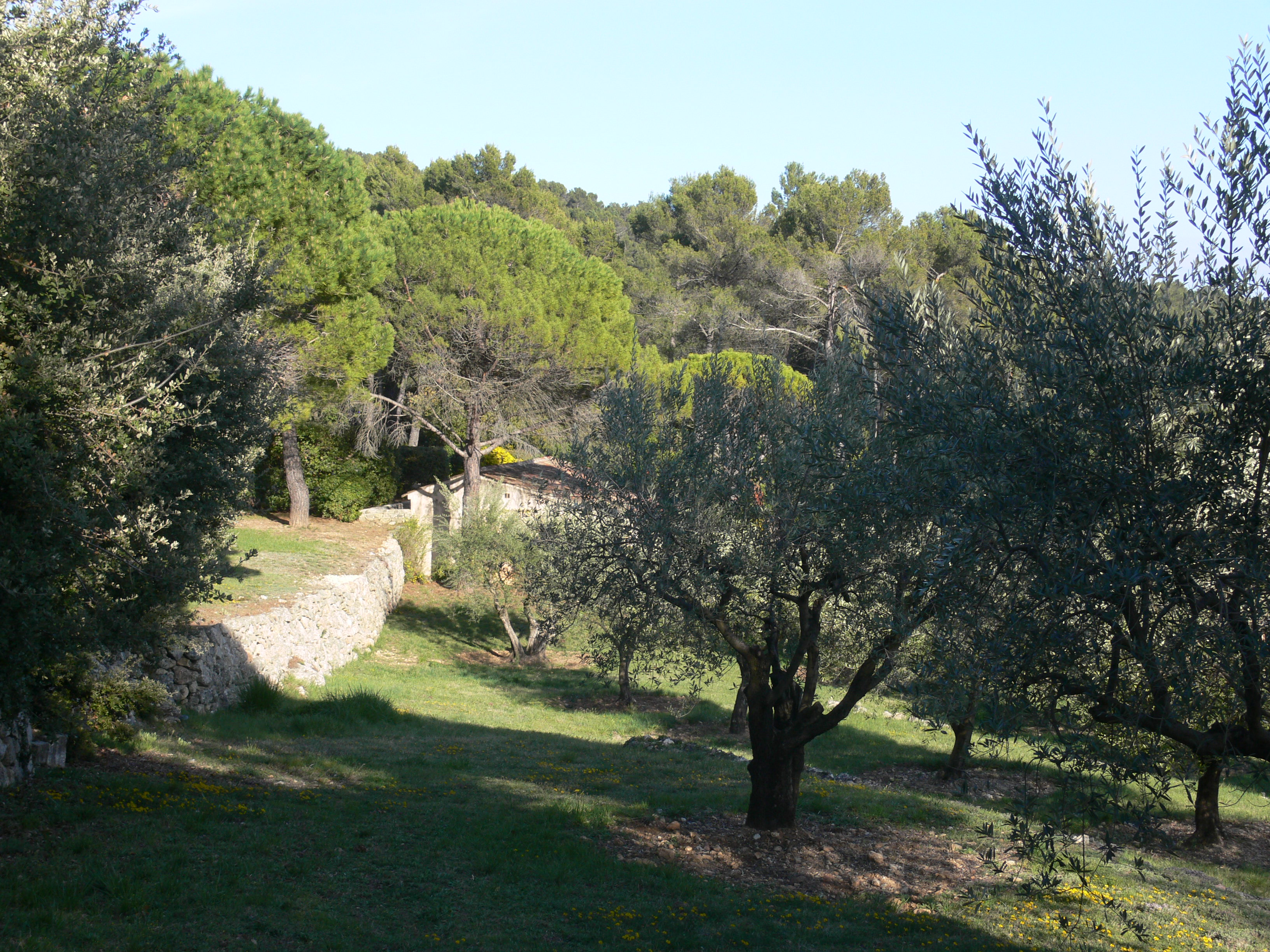 Domaine des Treilles - au pied du pavillon Amonites